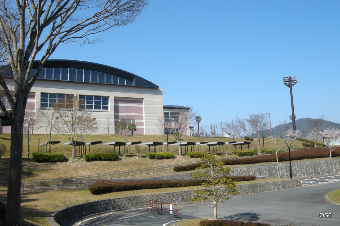 北広島町千代田運動公園